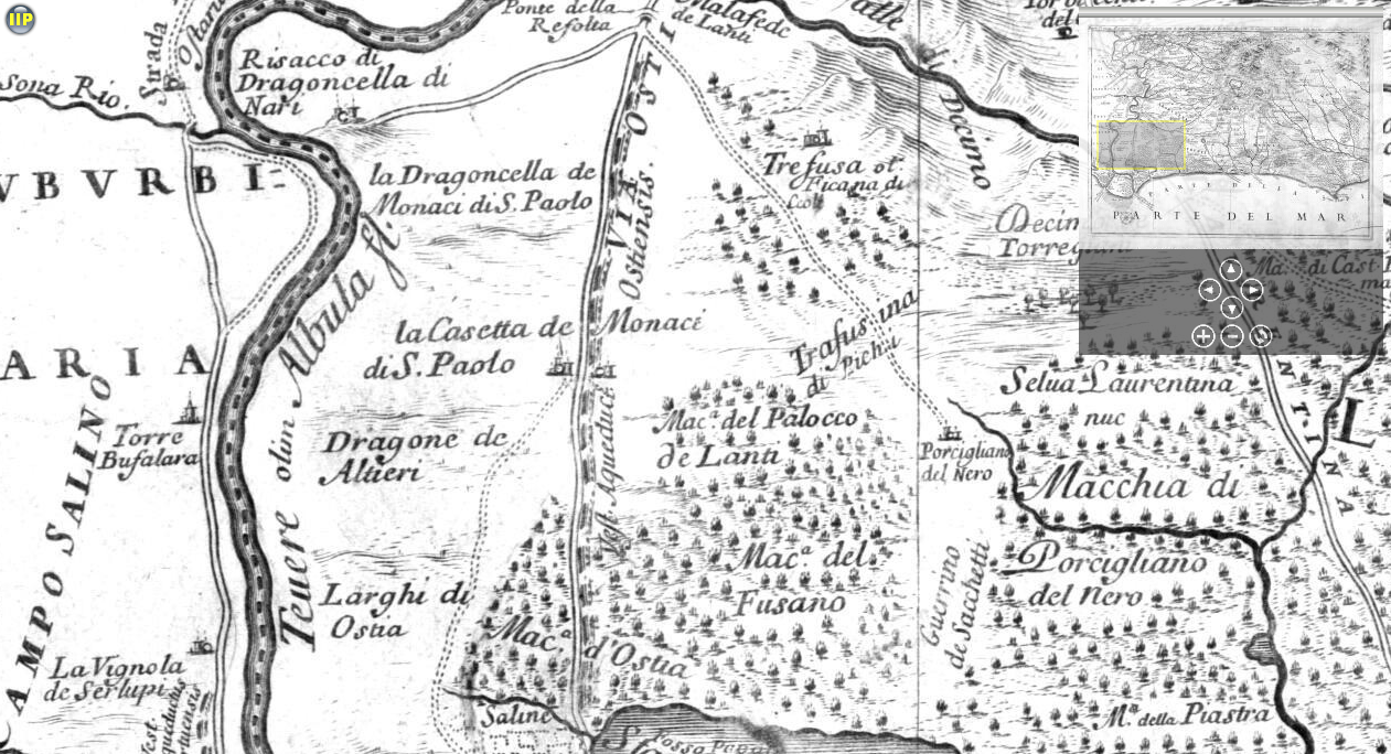 Il Lazio con le sue piu cospicue strade antiche, e moderne e' principali casali, e tenute di esso. Parte prima maritima del Latio distinta con le sue strade antiche e moderne